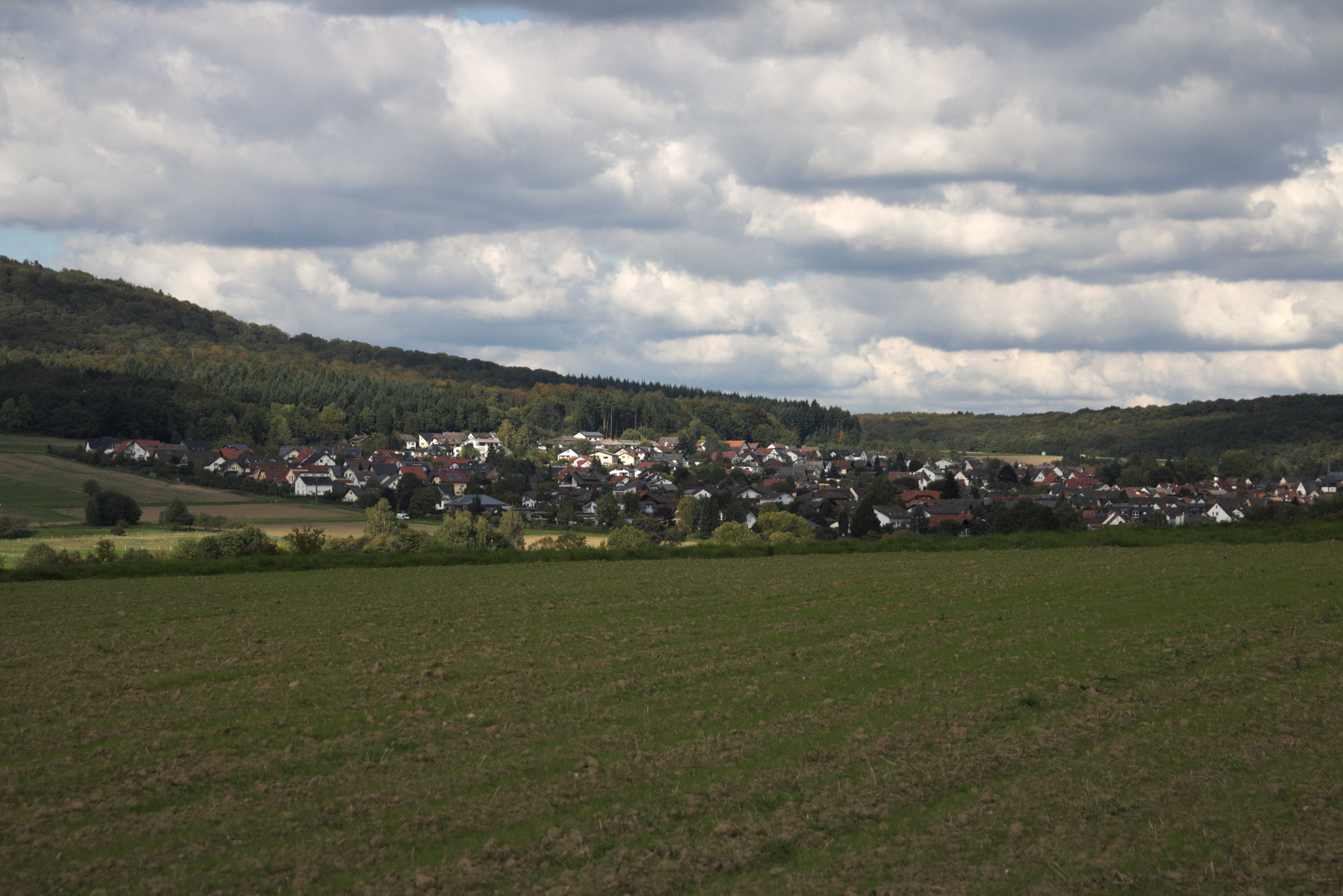 Die Ortschaft Fellingshausen von Rodheim aus gesehen.